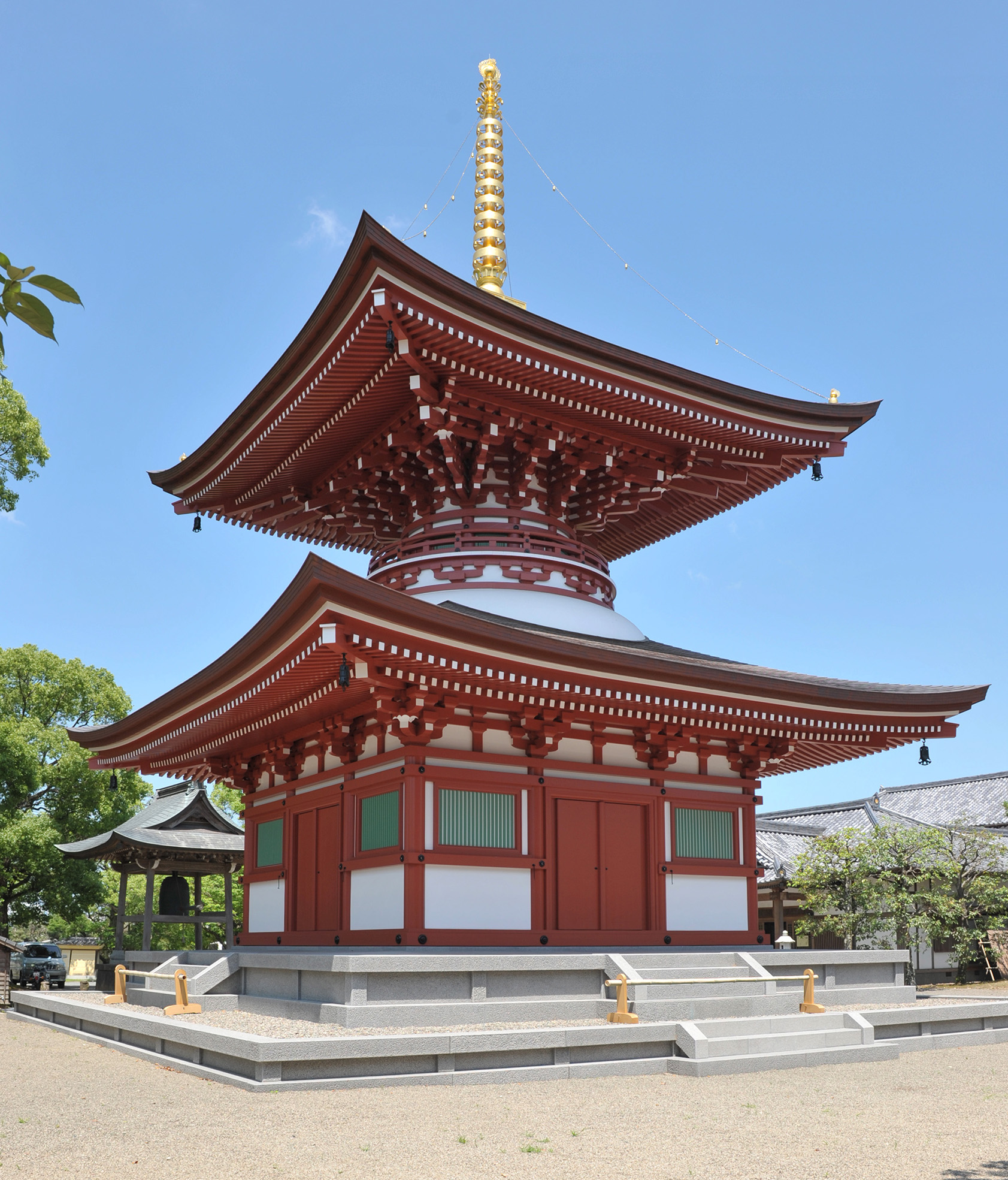 2018年5月12日に落成した蓮華院多宝塔。毎年1月13日・4月29日・6月13日にご開帳。